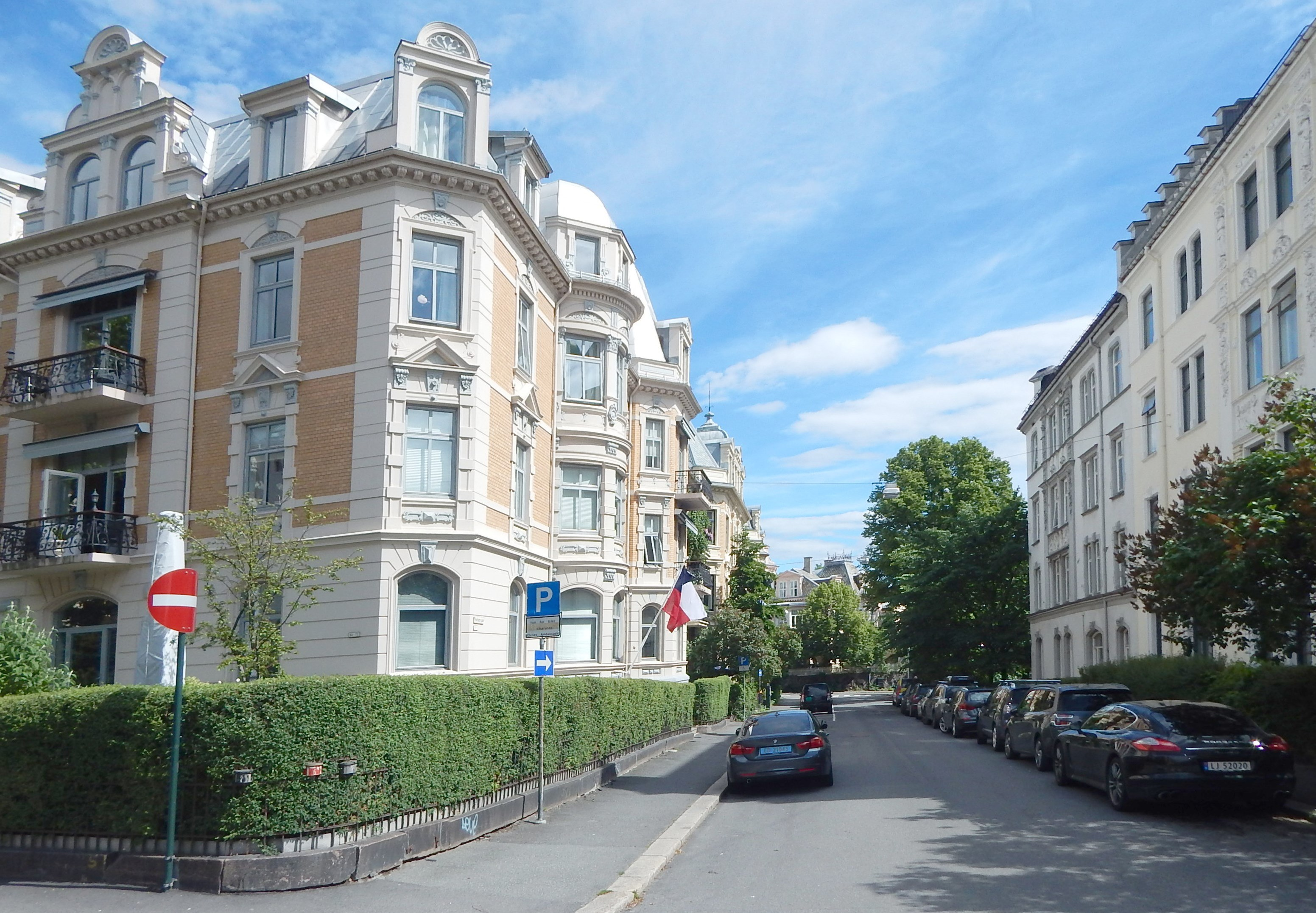 Meltzers gate i retning Dronningparken